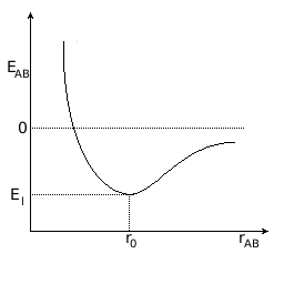 Biatomic molecule, energy diagram